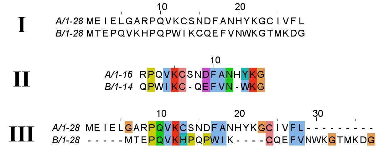 Пример локального выравнивания (II; EMBOSS Water) и глобального (III; EMBOSS Needle). Сами последовательности (I) сгенерированы вручную.